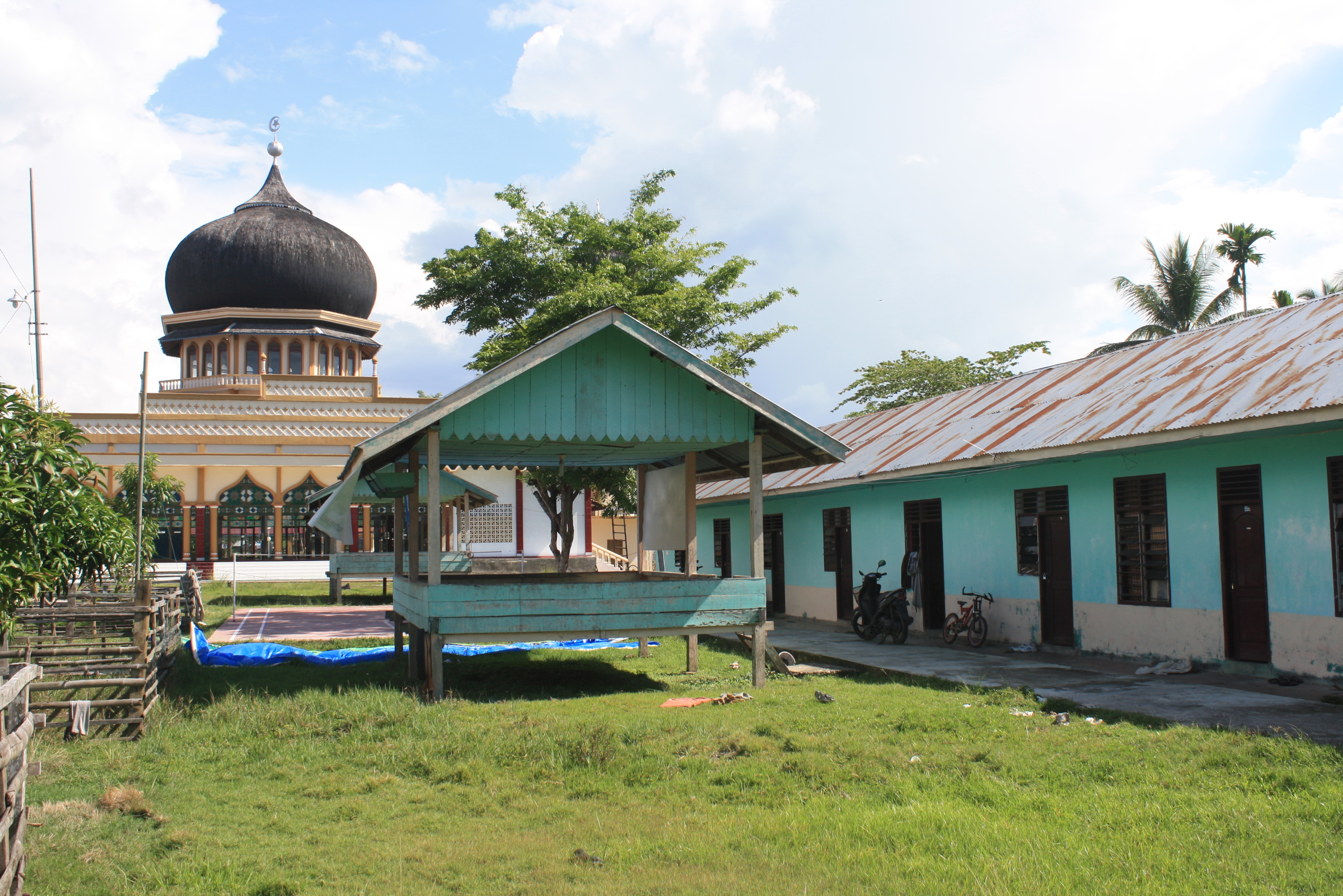 Dayah berdekatan dengan mesjid di Aceh Utara